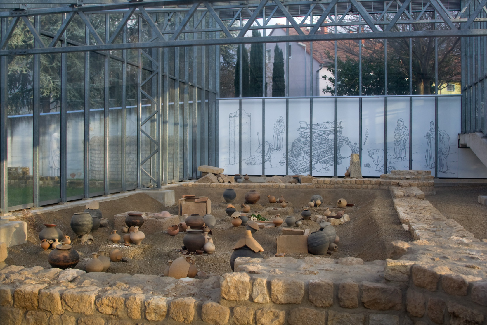 Schauausstellung eines Teils der Funde der via sepulcrum in Mainz-Weisenau